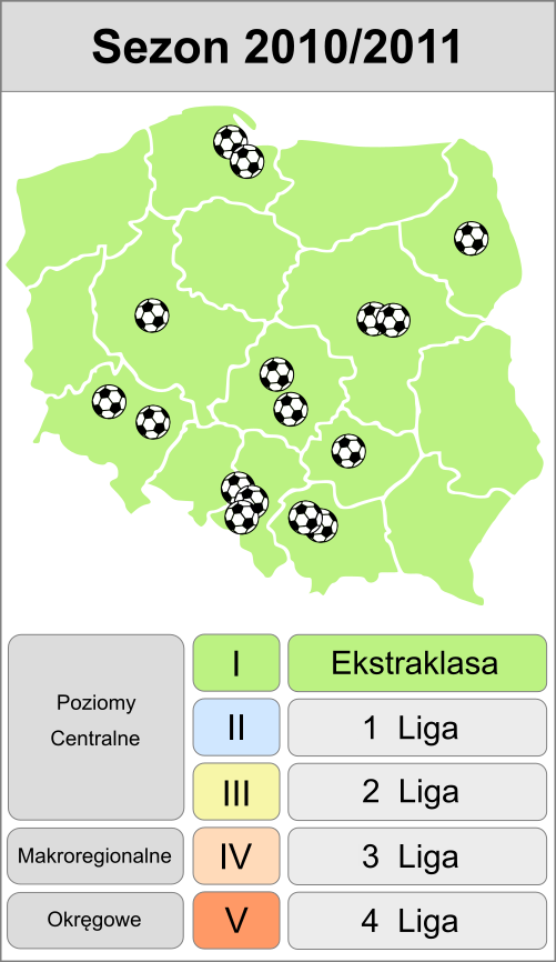 Jagiellonia w sezonie 2010/2011 - mapa